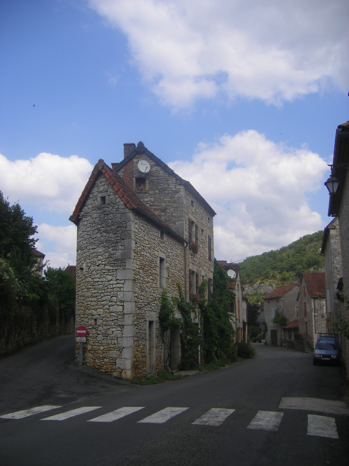 Marcilhac-sur-Célé